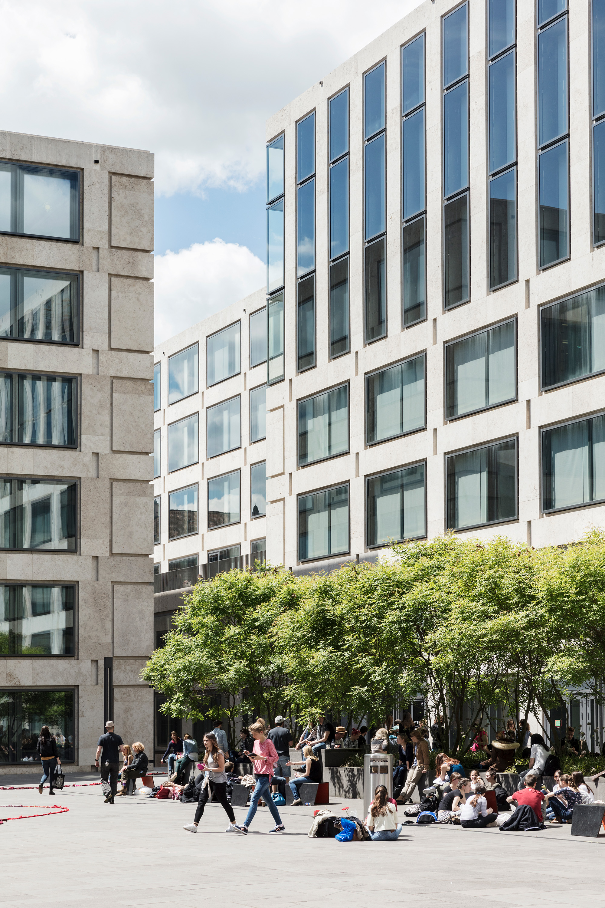 Der Campusplatz der PH Zürich.